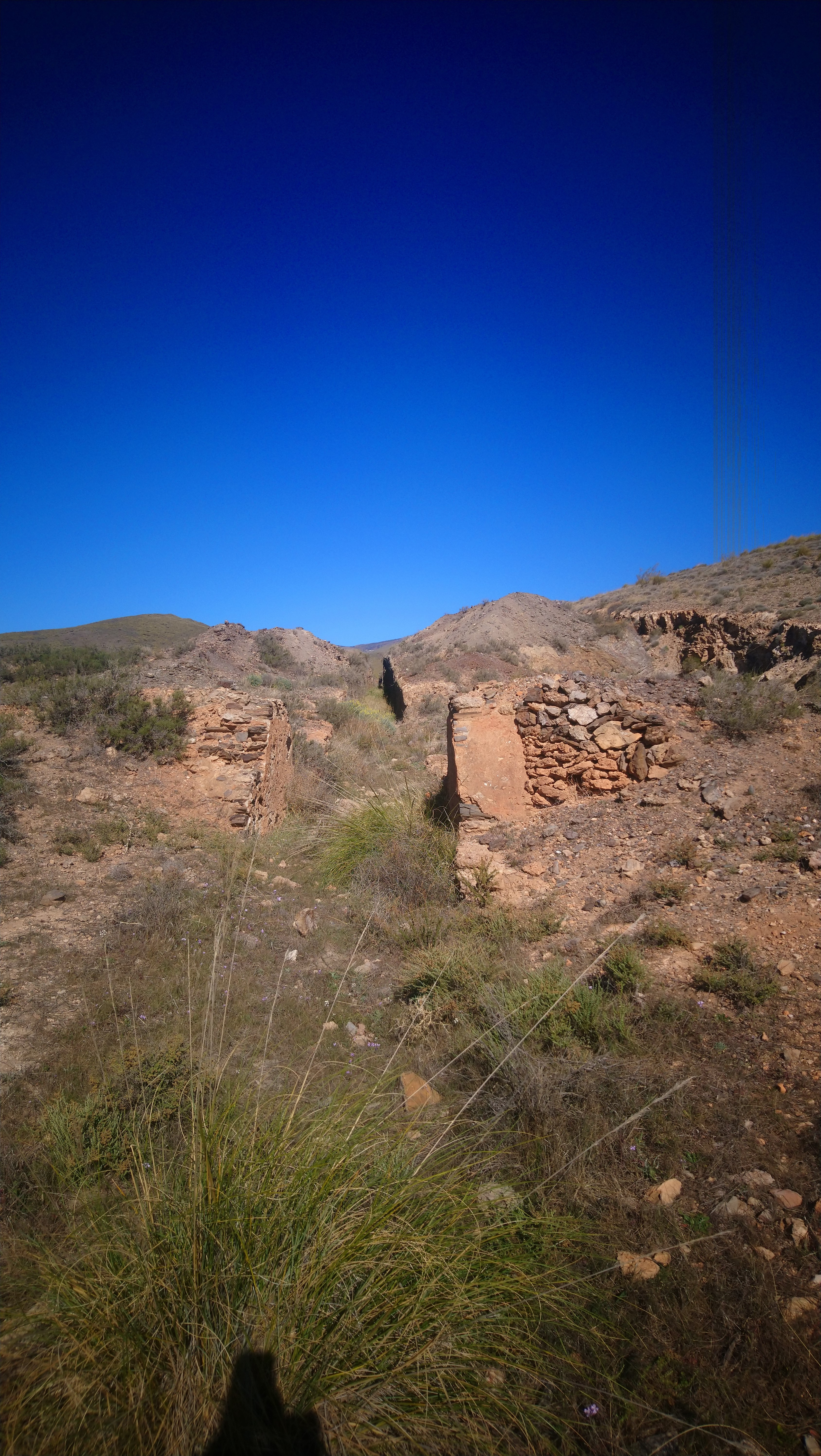 Ruinas del plano inclinado de la estación de Nacimiento